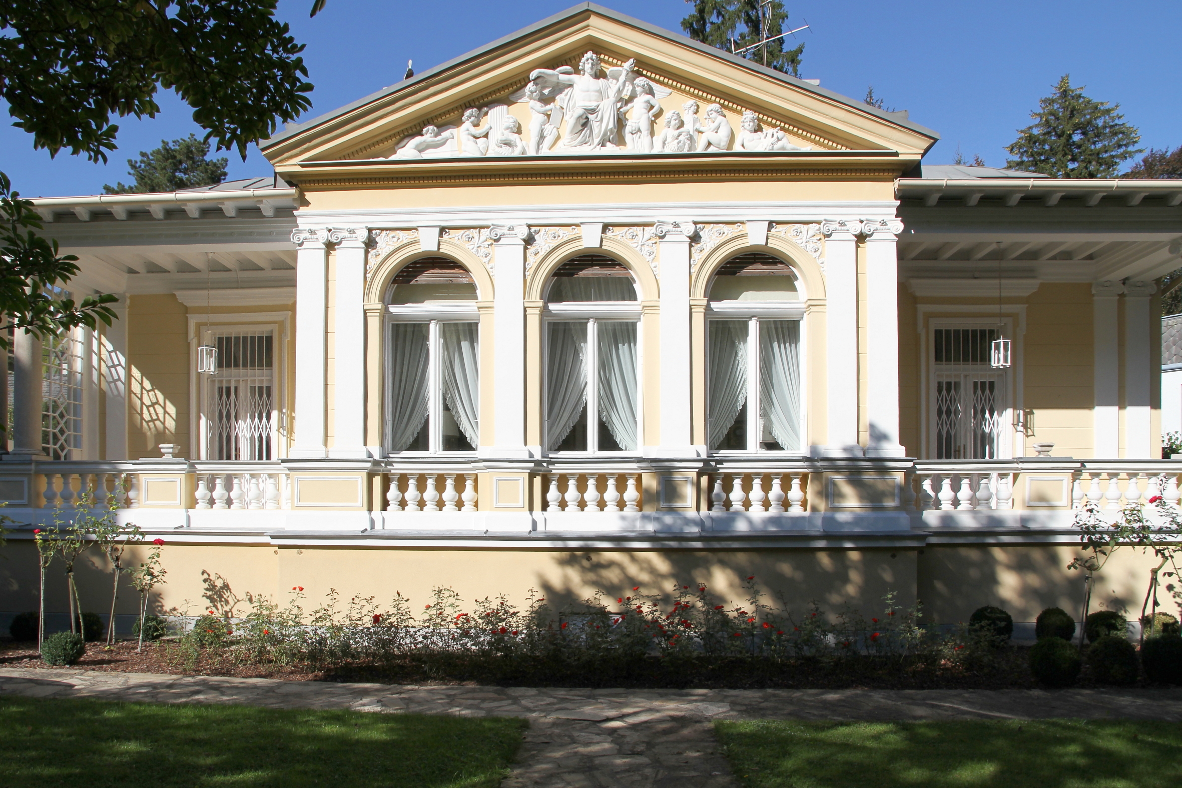 Die denkmalgeschützte Villa Olbricht in Weidling, eine Ortschaft in der niederösterreichischen Stadt Klosterneuburg.